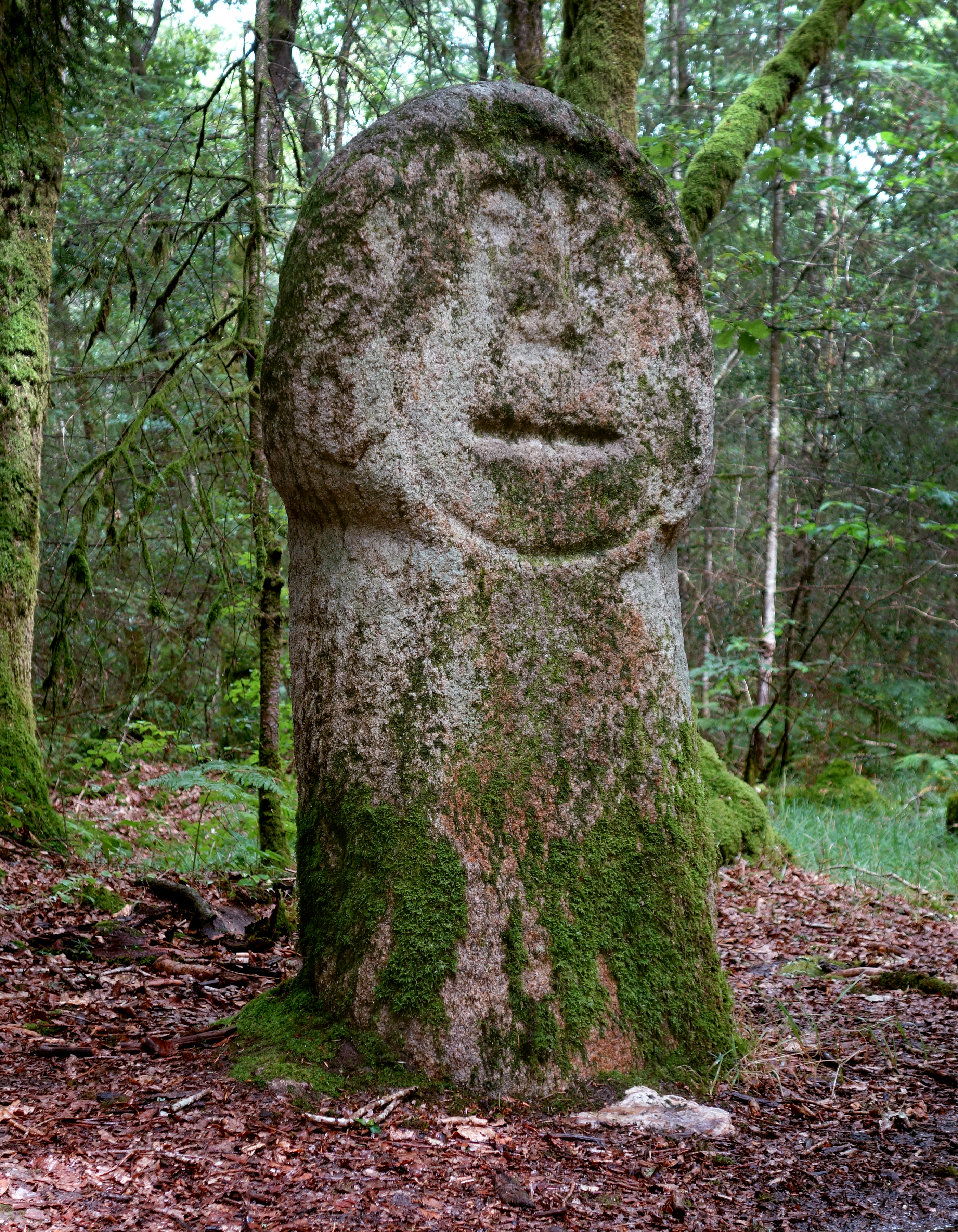 Le menhir sculpté dit « Le Babouin » près de Trédion dans le Morbihan - Juillet 2014 Probablement l'un des menhirs les plus surprenants de Bretagne : sculptés et anthropomorphes, avec son visage étrange et enfantin, c'est vraiment un cas unique !